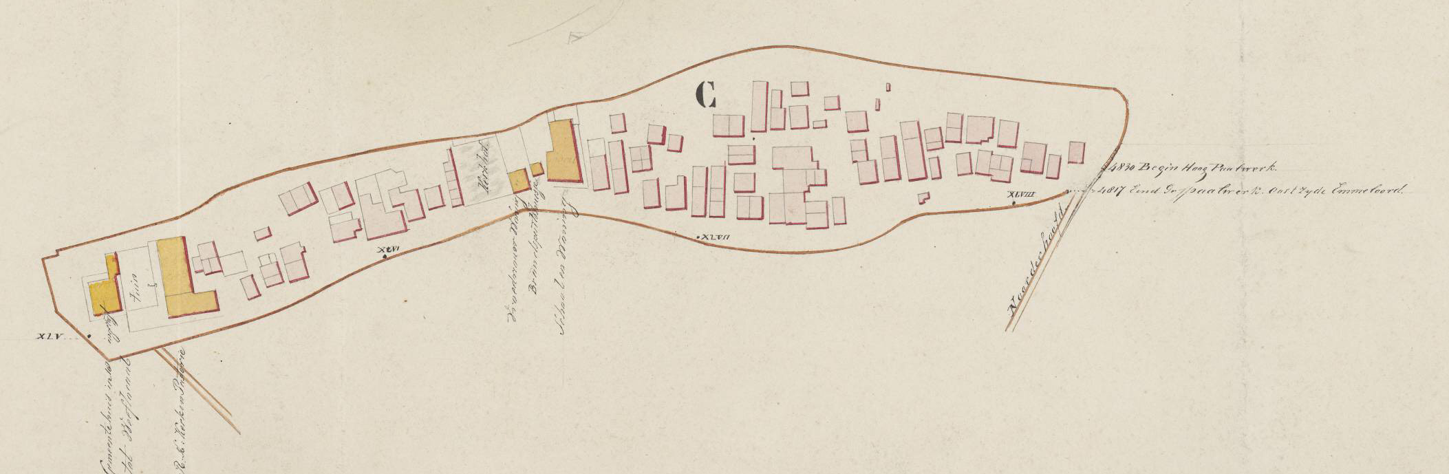 Detailkaartje van Emmeloord: gemeentehuis, RK kerk en pastorie, kerkhof, woning van de vroedvrouw, brandspuithuisje, school en schoolmeesterswoning. Het noorden is rechts aangegeven. Legenda en schaalstok zijn aanwezig. Dit stuk hoort bij RAO inventarisnummer 445B. NL-ZlHCO_KD000370